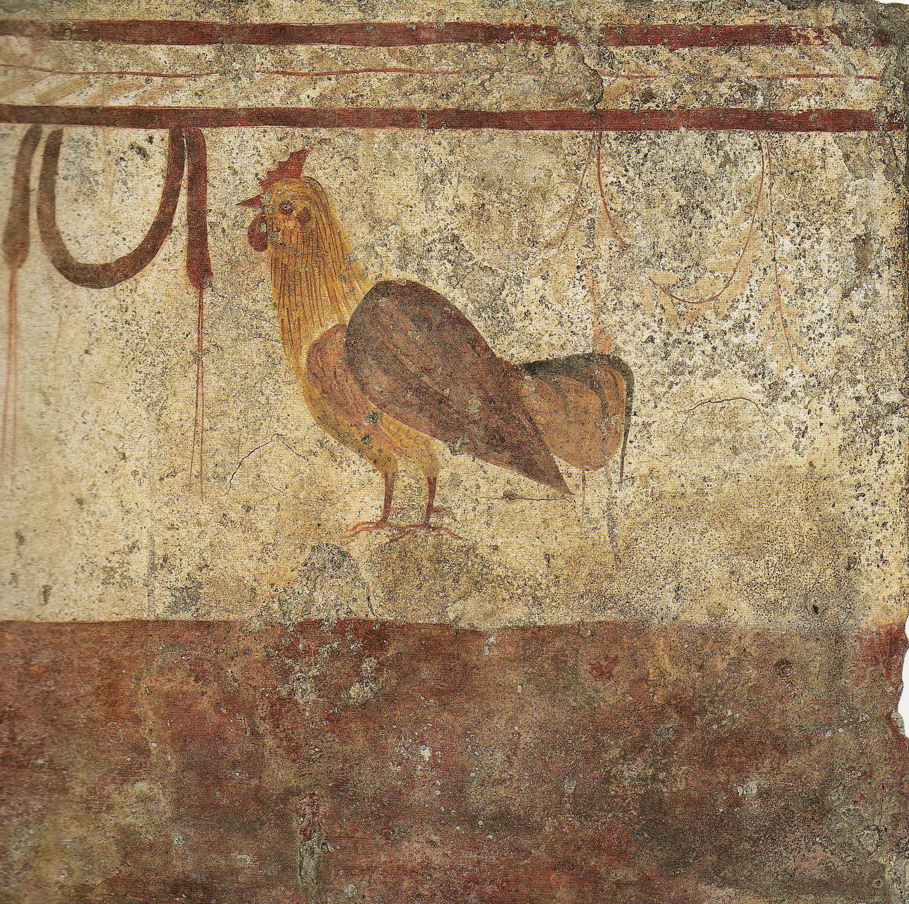 Paestum, Grab des bunten Hahnes. Detail